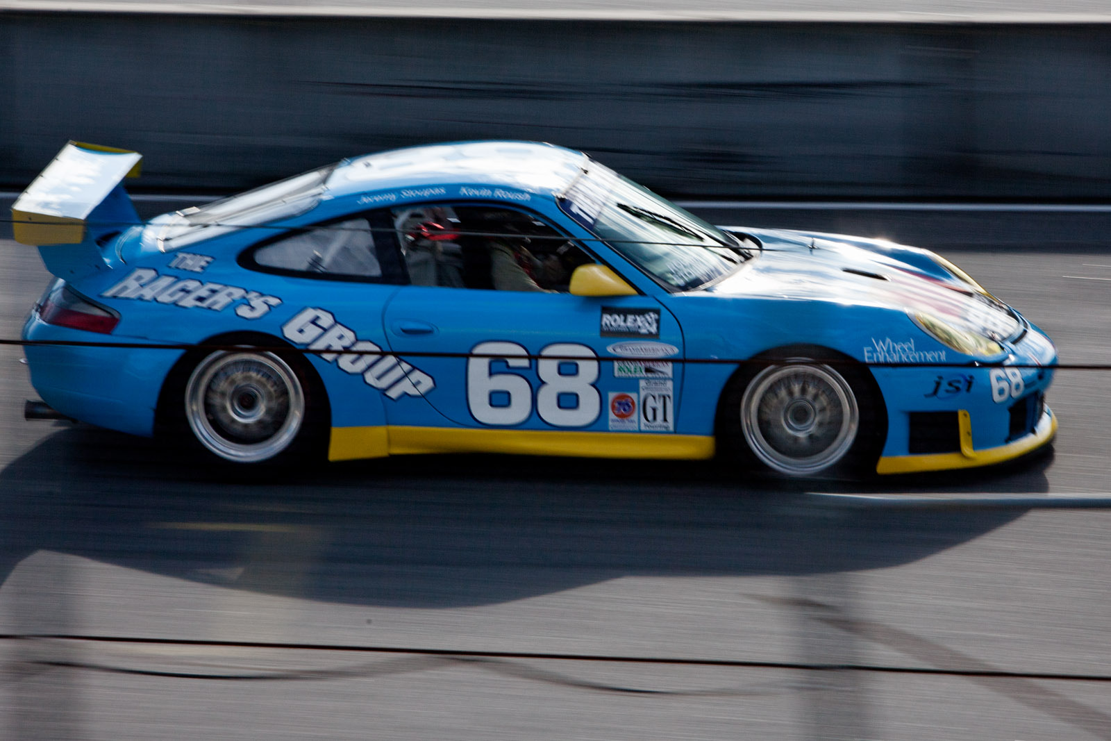 Porsche Rennsport Reunion IV